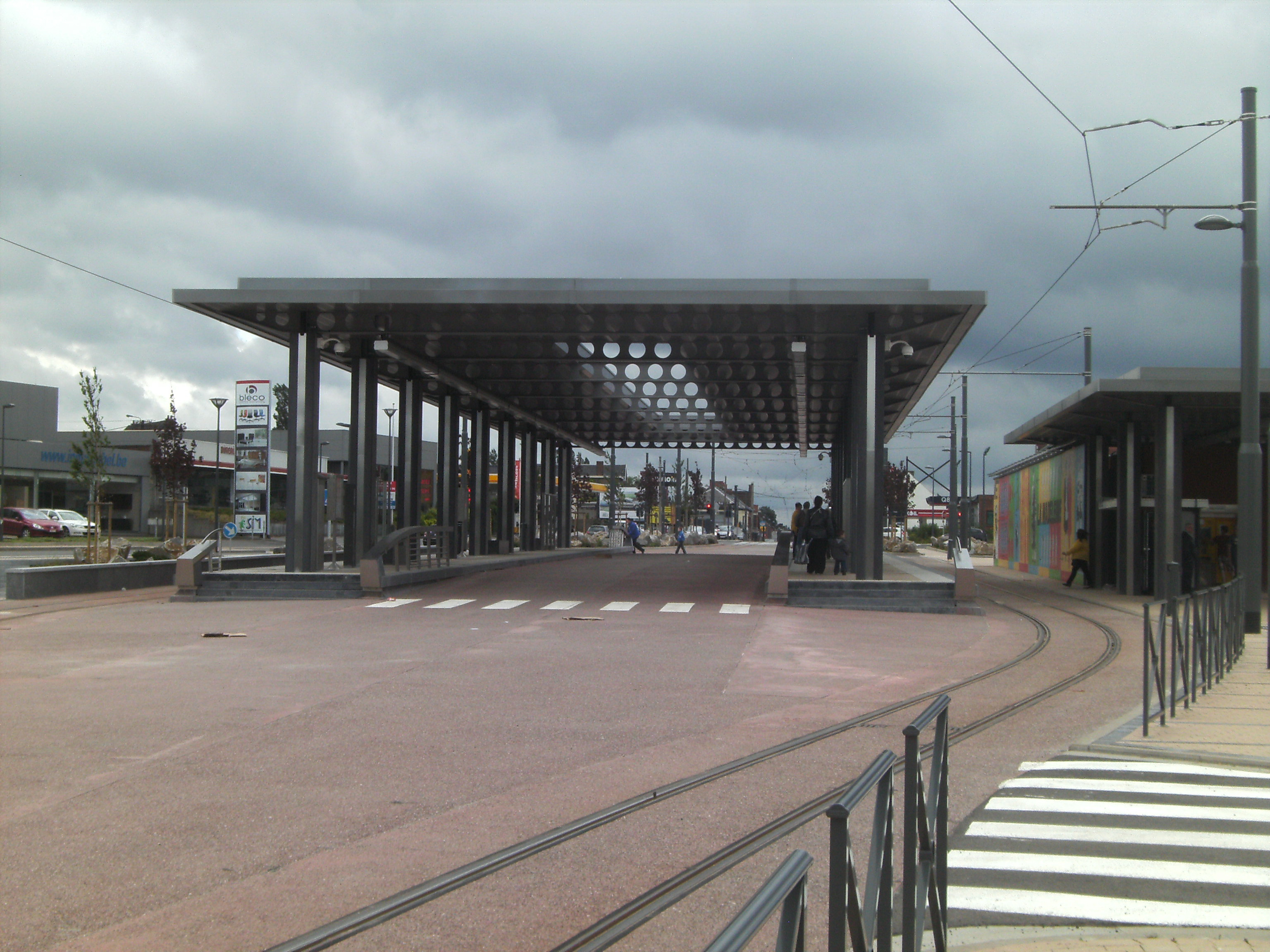 Madeleine metro station (Charleroi)